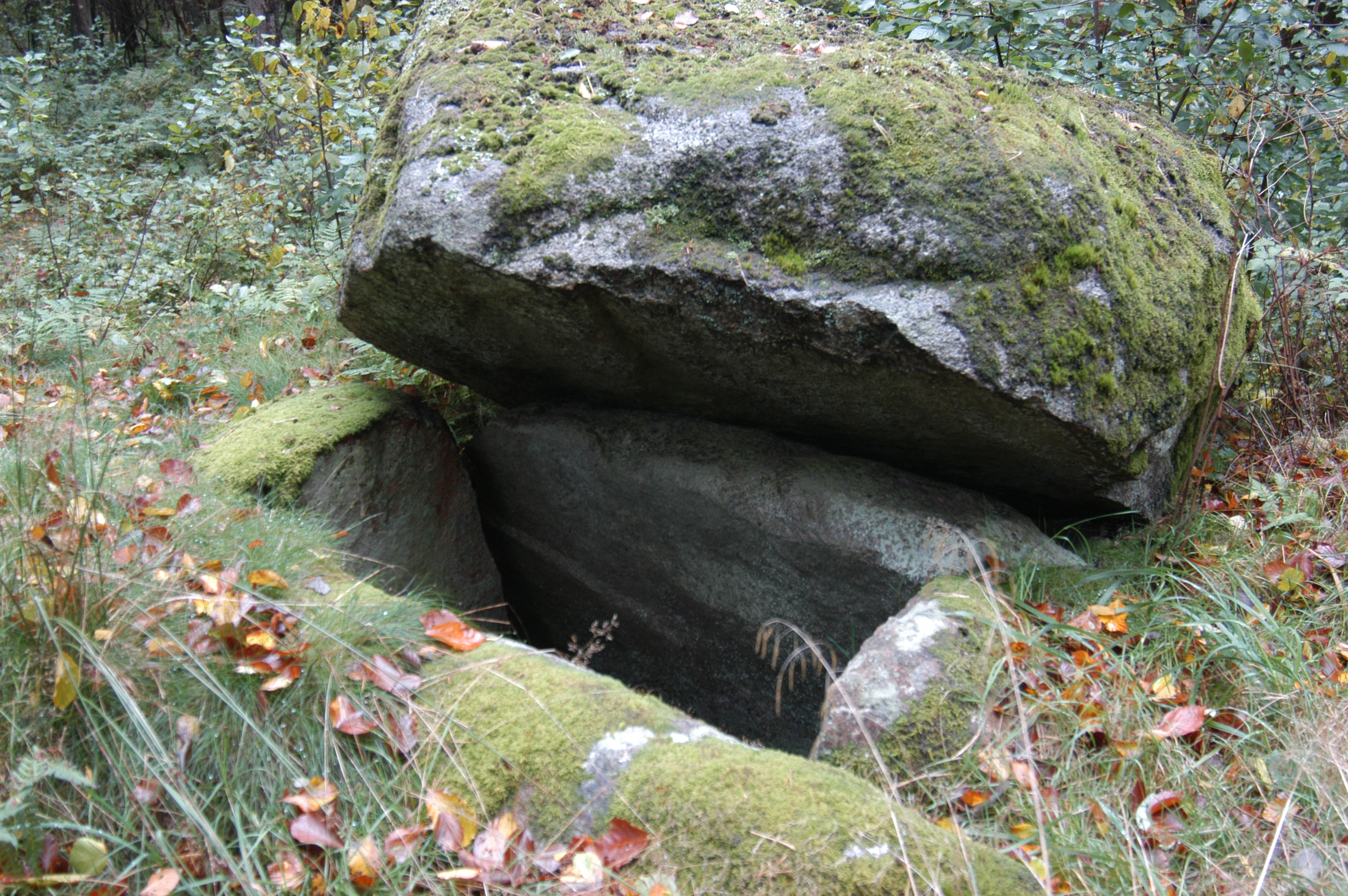 Dolmen in denmark (Horserød hegn)-North Zealand